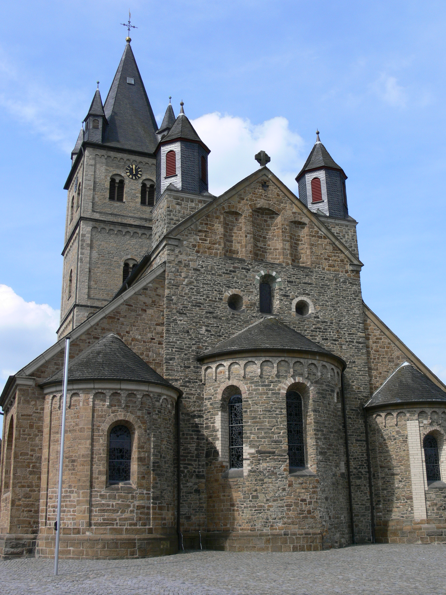 Wipperfürther Pfarrkirche St. Nikolaus